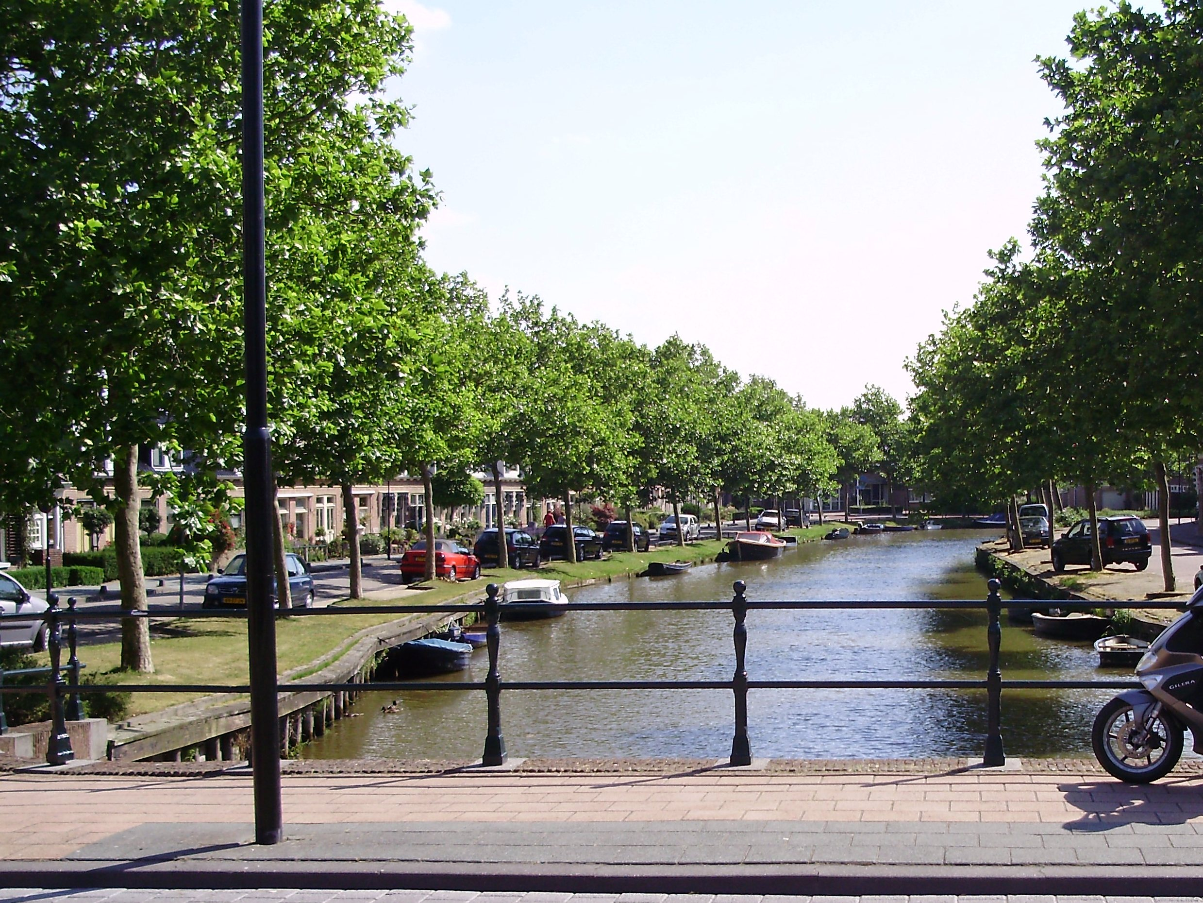 De Stadsgracht in Bolsward in gemeente Súdwest Fryslân